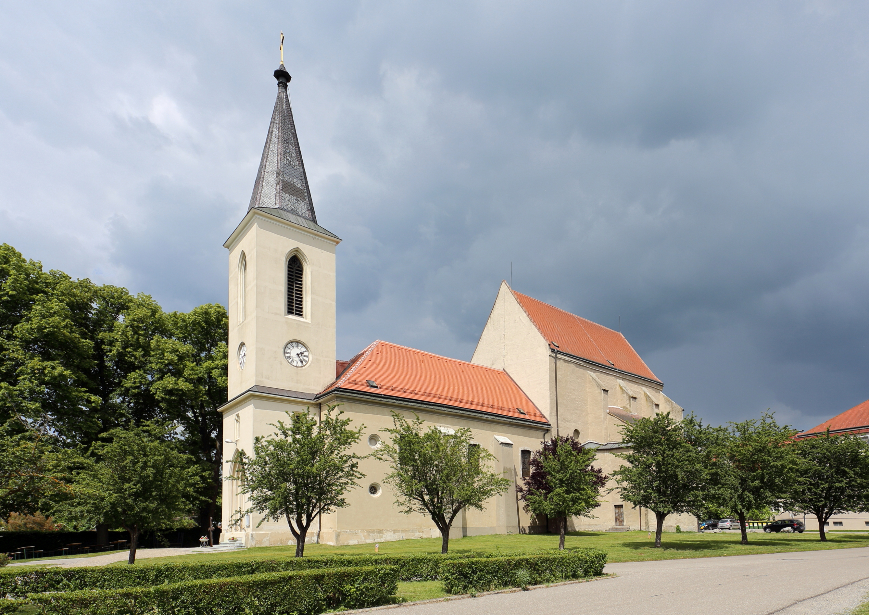 Südwestansicht der Pfarrkirche hl. Margaretha der niederösterreichischen Stadt Marchegg. Der mächtige, mehrfach veränderter Sakralbau mit dominierendem frühgotischem Chor aus dem 3. Viertel des 13. Jahrhundert war ursprünglich von einem Friedhof umgeben und befindet sich in der Stadtmitte. Die Kirche war 1268 als große dreischiffige Stadtpfarrkirche konzipiert. Nach schweren Zerstörungen durch den ersten österreichischen Türkenkrieg 1529 und 1634 (Schwedenkrieg) wurde nur der Chorbau als Kirche verwendet. Unter Karl Fürst Pálffy errichtete man 1789/90 das wesentlich kleinere Langhaus. Der zweigeschossige Westturm mit steilem Spitzhelm wurde 1855 errichtet.